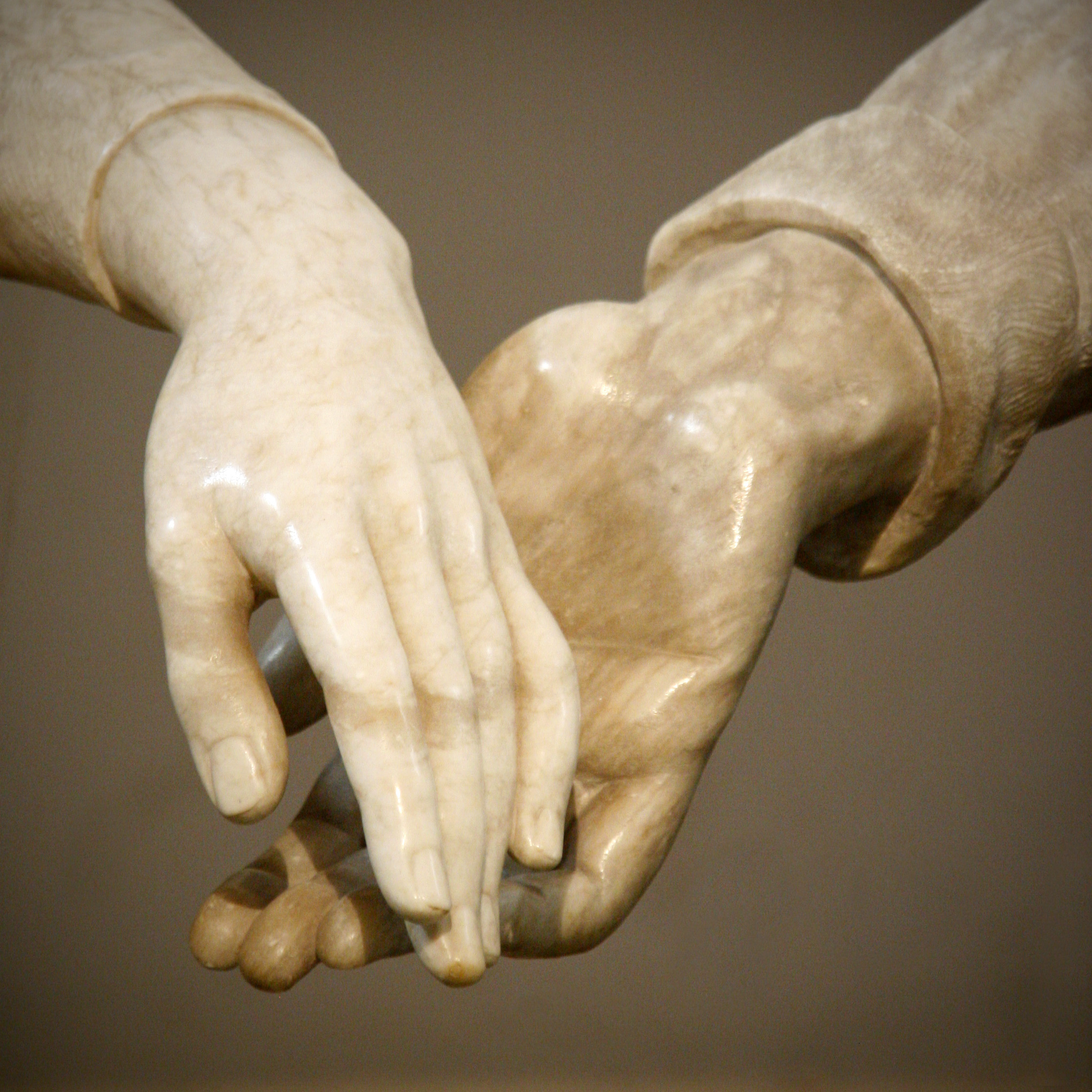 La historia o leyenda de los Amantes de Teruel cuenta la historia de amor entre dos jóvenes turolenses, Isabel de Segura y Juan Martínez de Marcilla, conocido a partir de las recreaciones del teatro barroco como Diego. Desde 1996 se celebra en Teruel, como recordatorio de la tradición, la festividad de Las Bodas de Isabel de Segura.